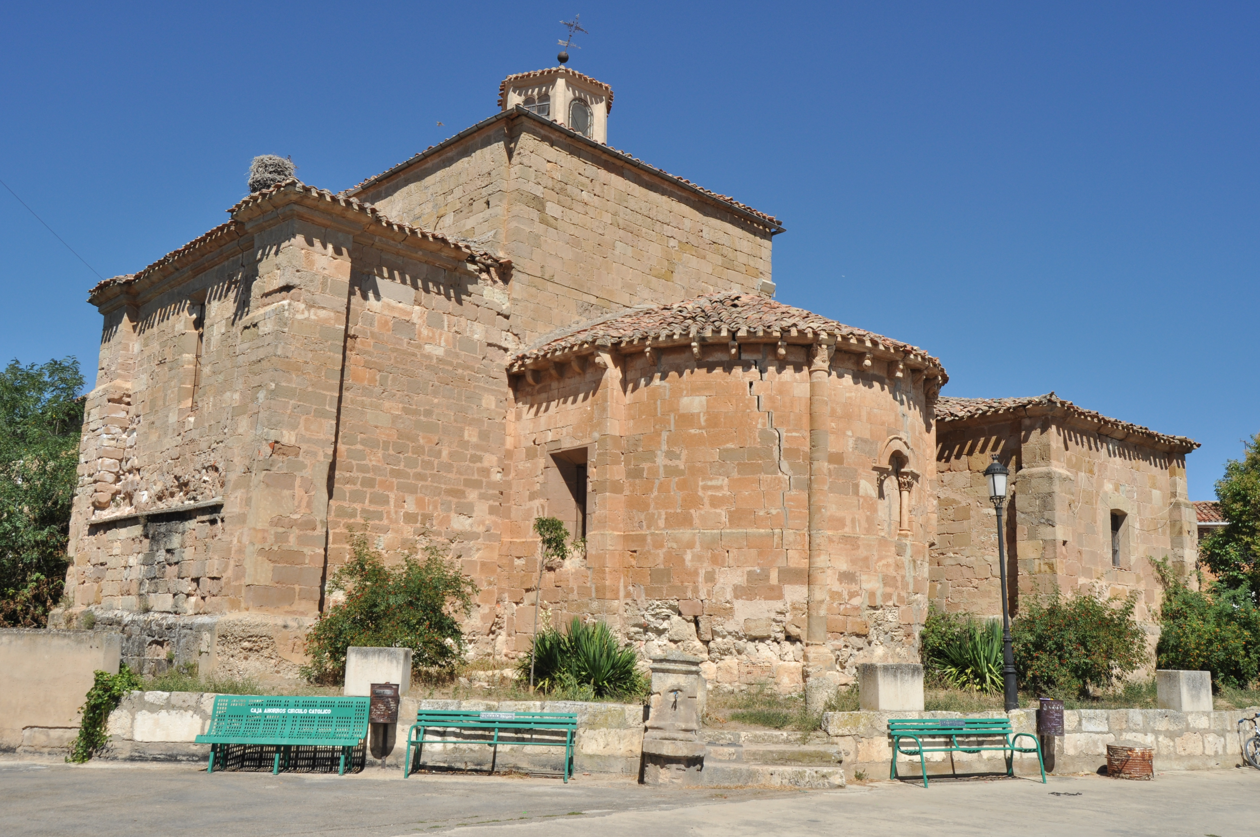 Aguilar de Bureba - 001